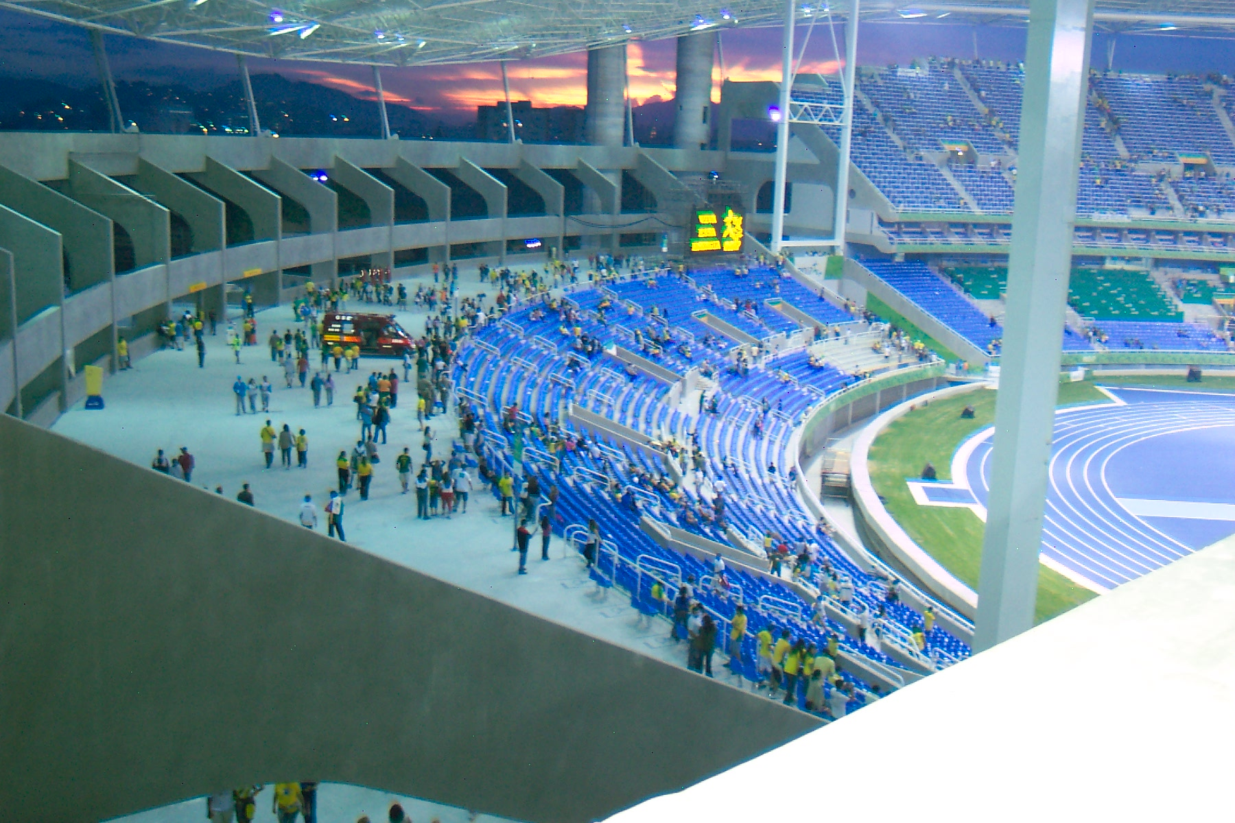 Arquibancadas de trás do gol {setor sul} do Estádio Olímpico João Havelange após o jogo Brasil 2-0 Costa Rica, pelo torneio masculino do Pan de 2007, e corredor de circulação do estádio.